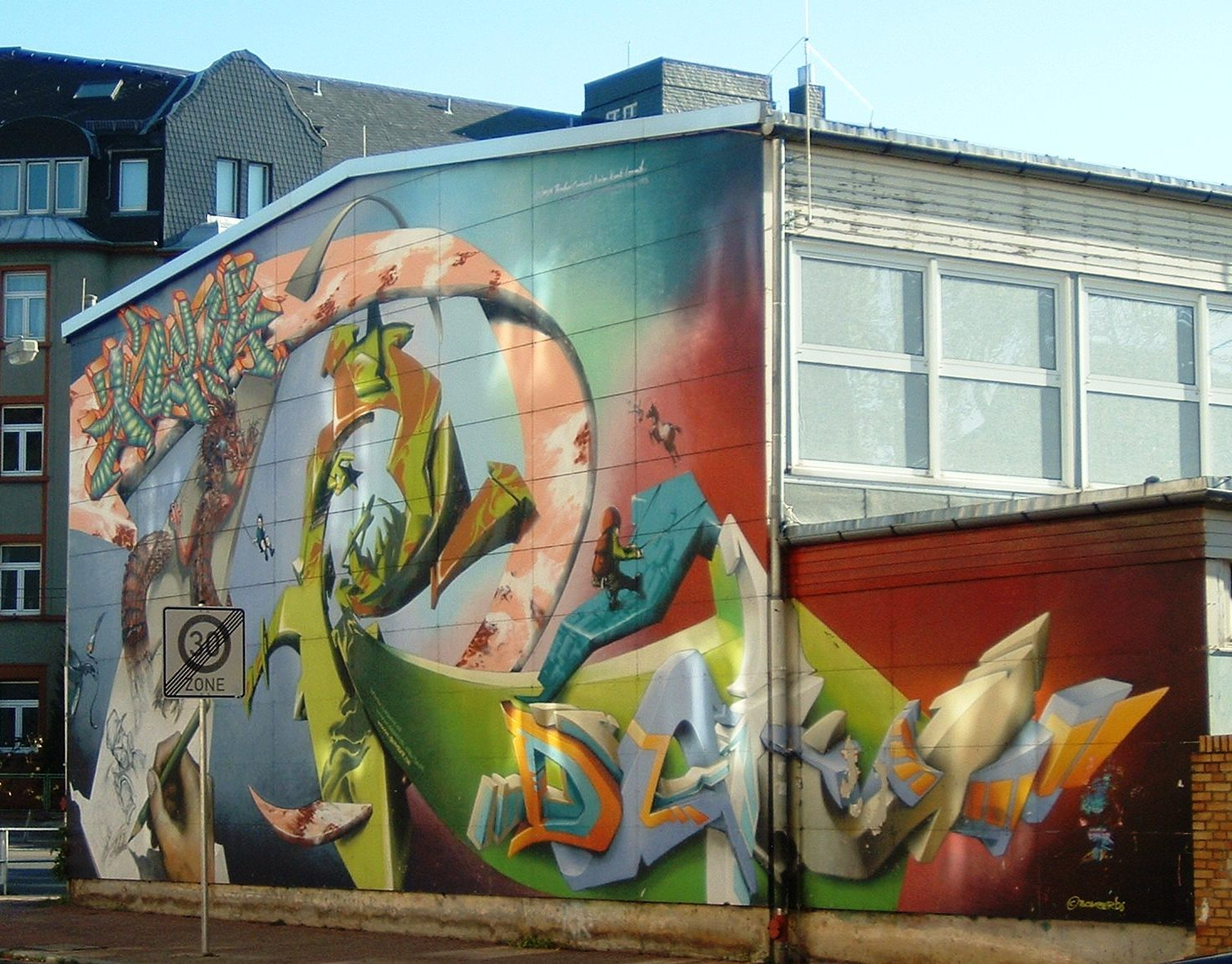 Sophienschule (Frankfurt am Main), Graffitikunst an der Turnhalle aus dem Jahr 1998, von DAIM (* 1971 in Lüneburg; eigentlich Mirko Reisser), ein deutscher Graffiti-Writing-Künstler. Gemeinschaftswerk mit den Graffiti-Künstlern: Bomber, Loomit, Klark Kent, Codeak